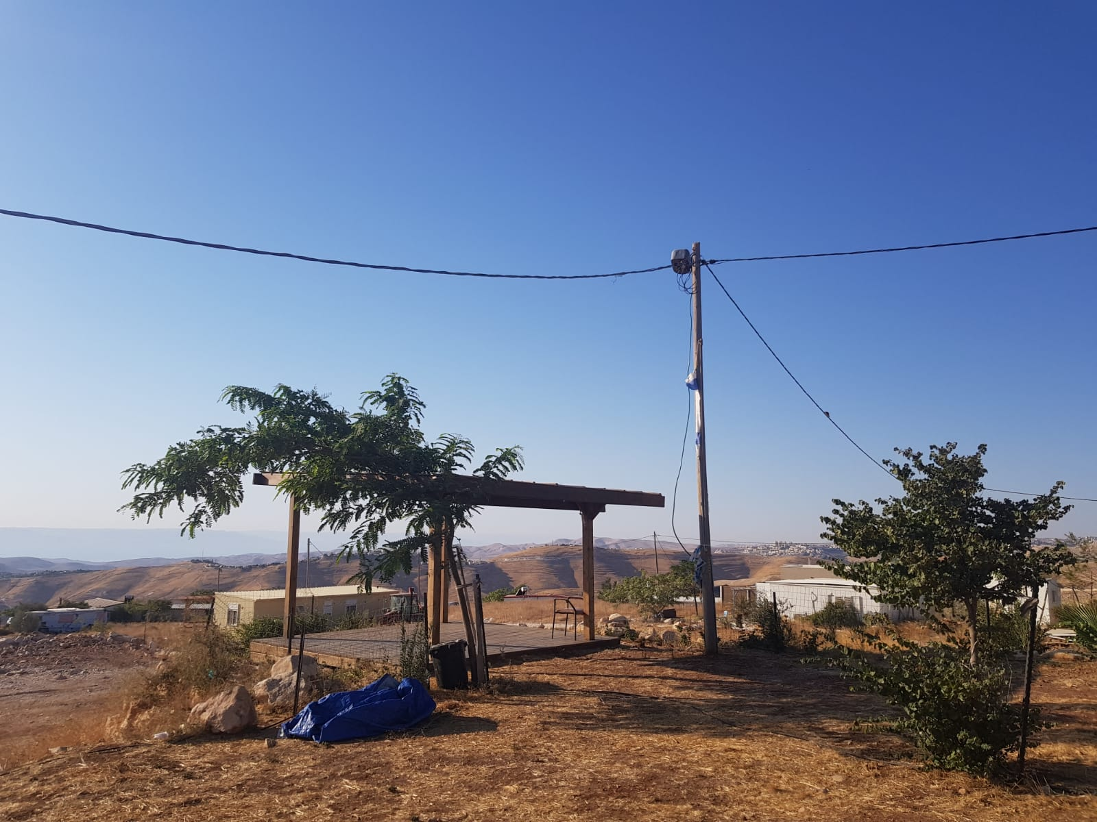 מצפור היישוב